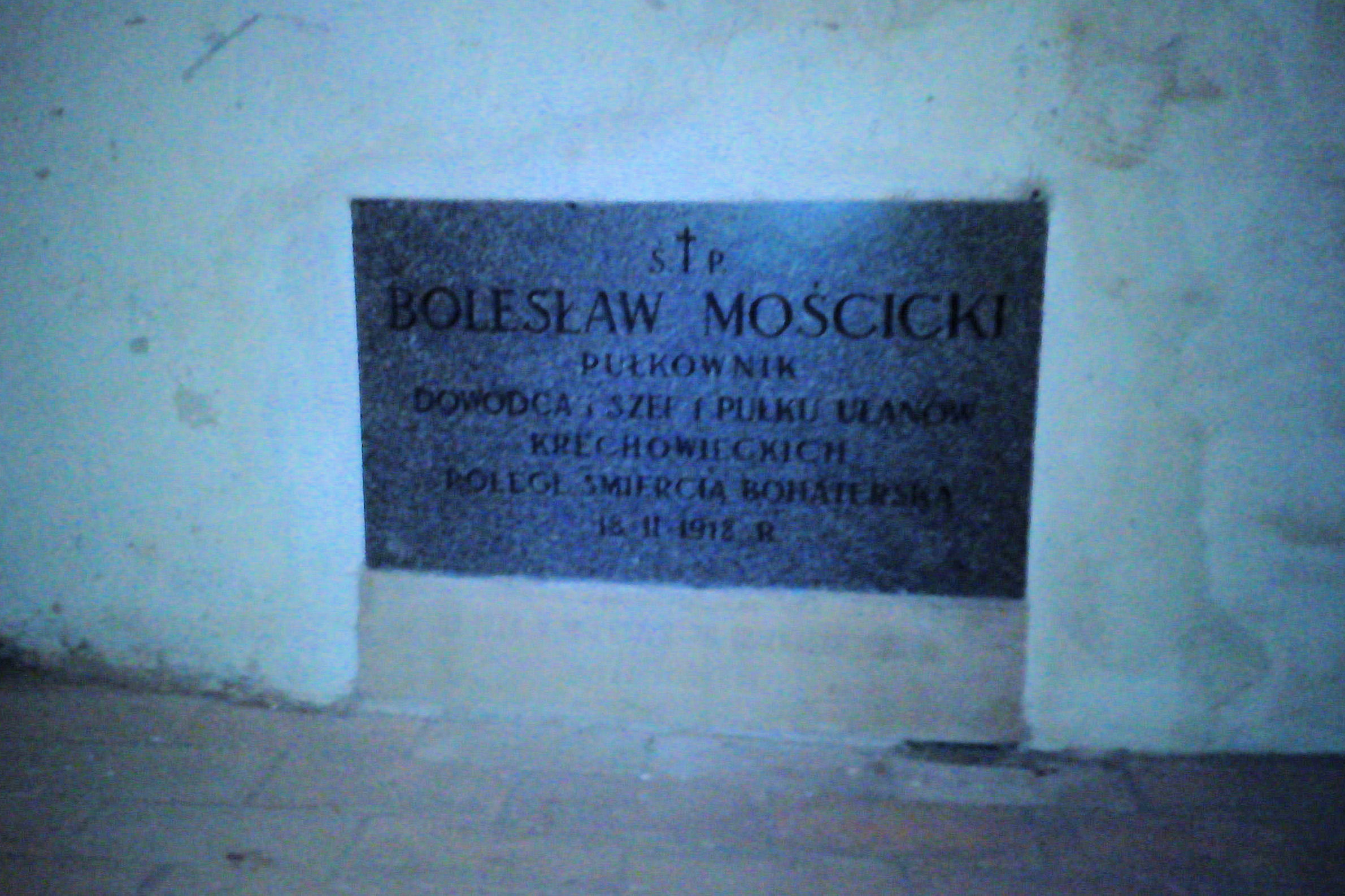 Grób Bolesława Mościckiego w nie udostępnionych publicznie kryptach podziemia Bazyliki Św. Krzyża w Warszawie przy ul. Krakowskie Przedmieście 3 (stan 6 kwietnia 2014)